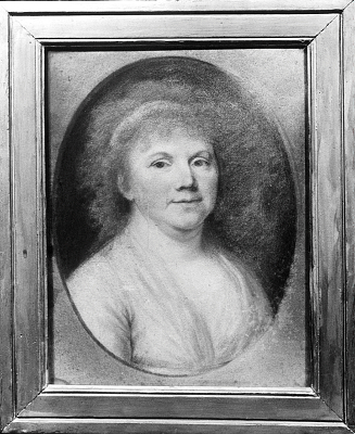 Benedicte Henrikka Løvenskiold née Aall (1756-1813), pastell, repro av Væring 1966